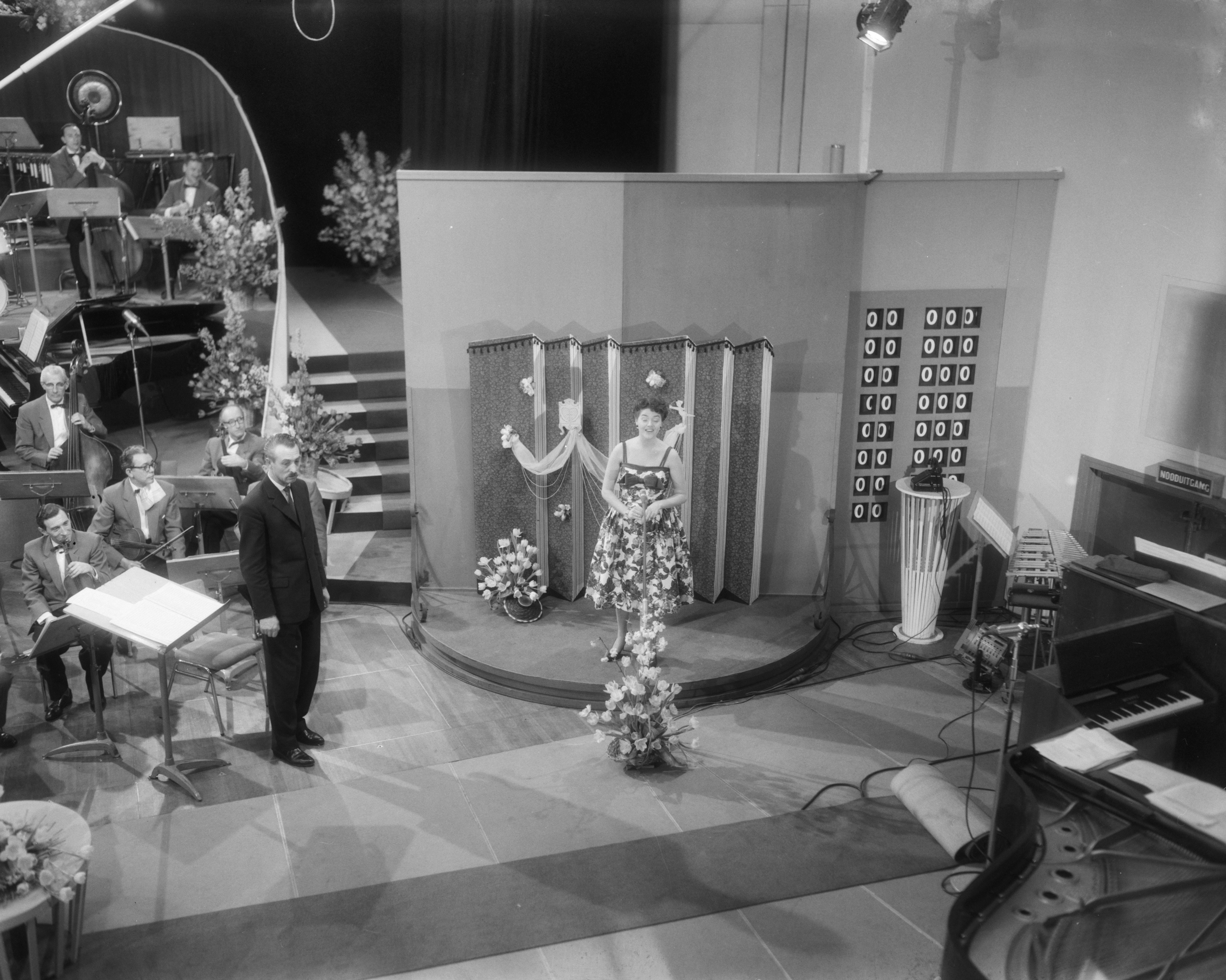 Collectie / Archief : Fotocollectie Anefo Reportage / Serie : [ onbekend ] Beschrijving : Eurovisie Songfestival 1959. Nederlandse finale. Teddy Scholten Datum : 17 februari 1959 Trefwoorden : artiesten, muziek, songfestivals Persoonsnaam : Scholten, Teddy Fotograaf : Pot, Harry / Anefo Auteursrechthebbende : Nationaal Archief Materiaalsoort : Negatief (zwart/wit) Nummer archiefinventaris : bekijk toegang 2.24.01.04 Bestanddeelnummer : 910-1621